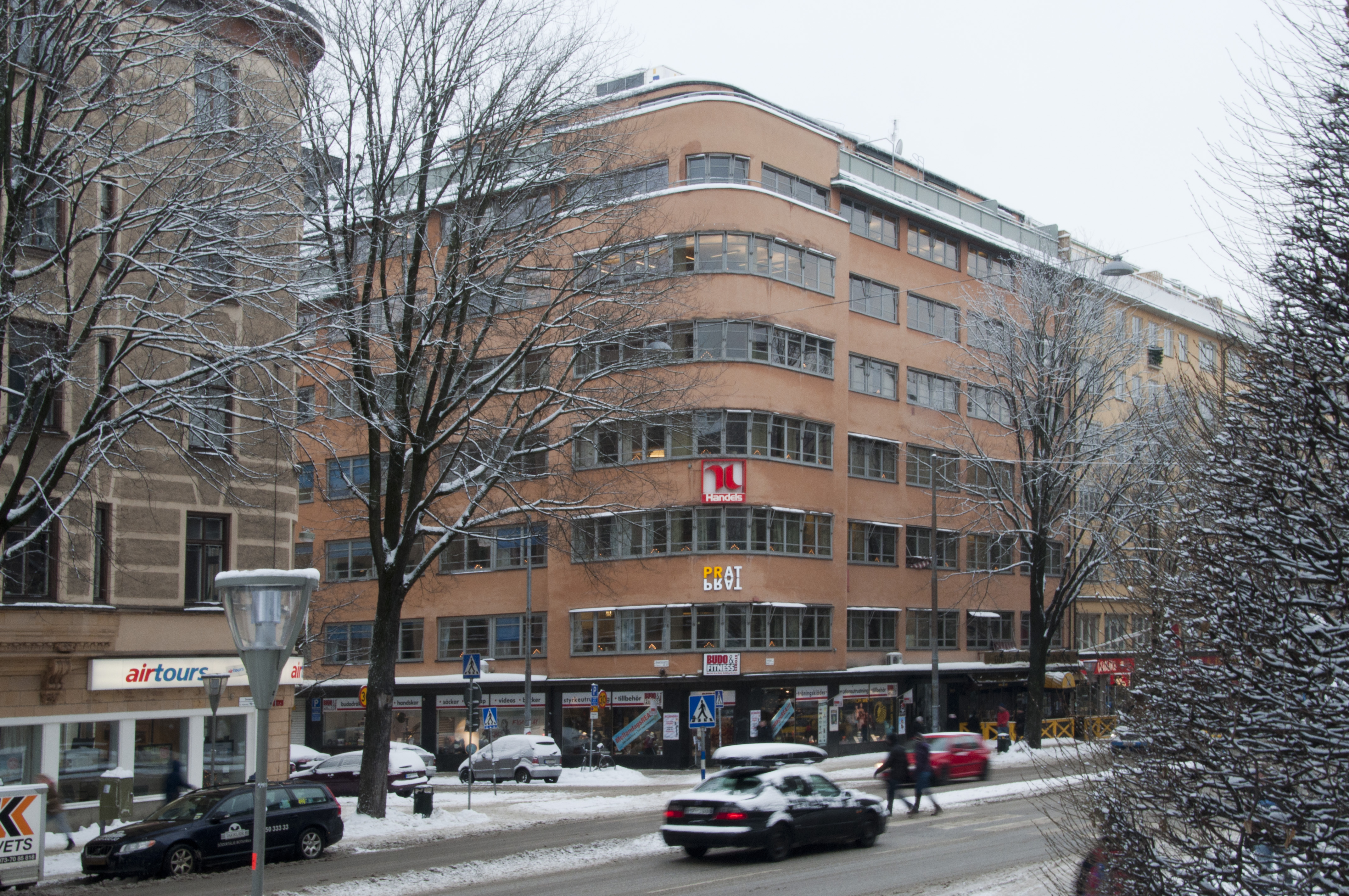 Ursprungligen tryckeribyggnad för Normans bokbinderi Byggnadsår 1930-31, arkitekt Jakob Hebert, byggherre Fastighets AB Sjökatten, byggmästare Olle Engkvist.